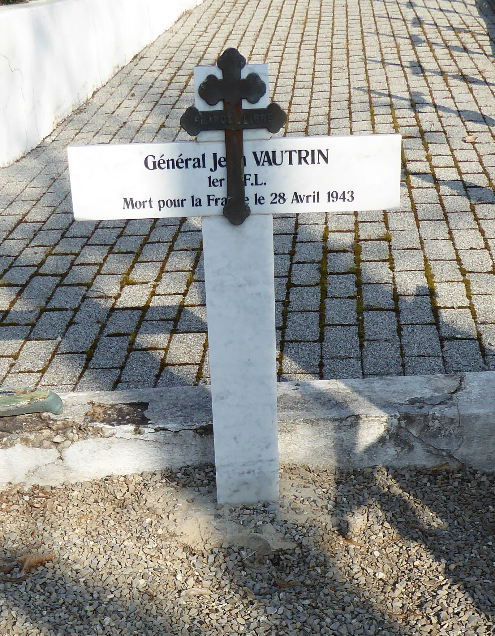 Cimetière Rabiac (Antibes)